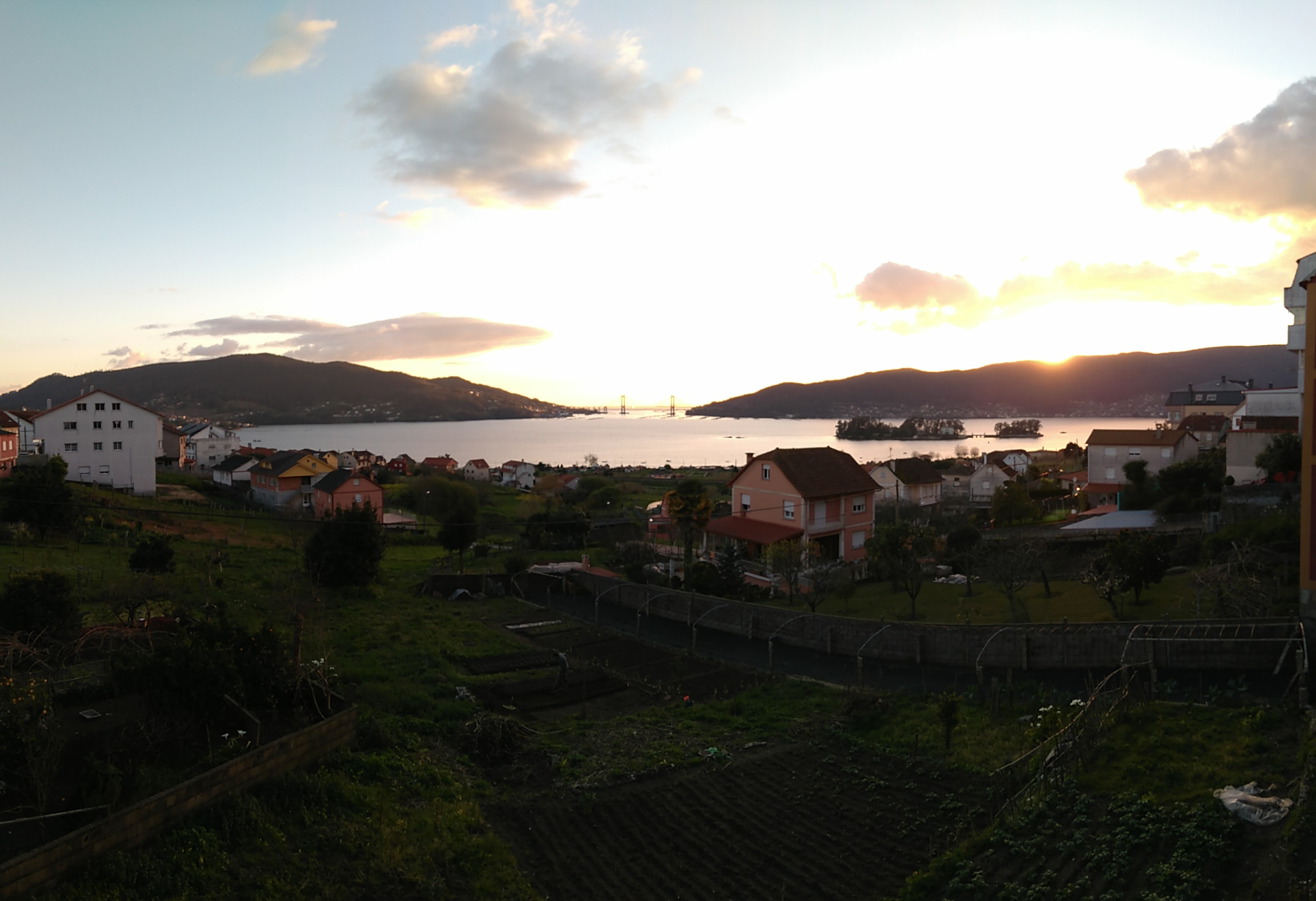 Carballiño, Cesantes